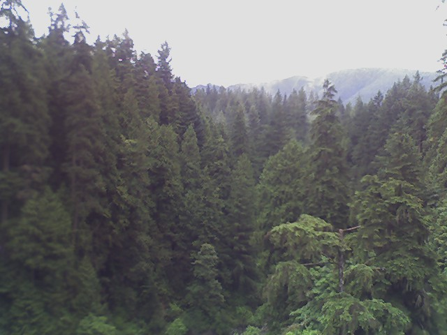 lo tomé, lo doy